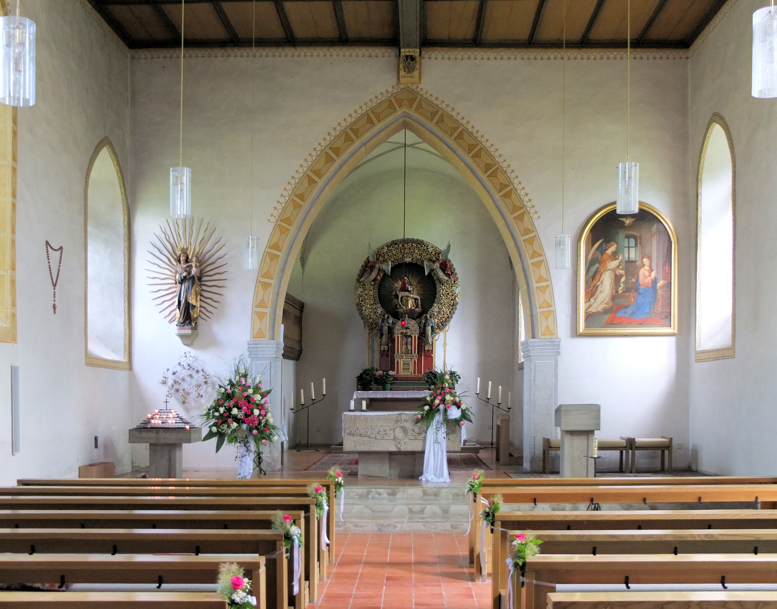 Blick in Richtung Altar in der Wallfahrtskapelle Neusaß bei Schöntal.